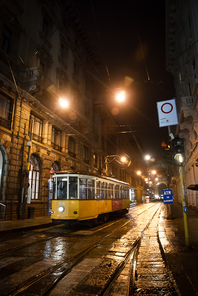 Via Tommaso Grossi a Milano. Vettura tranviaria n. 1936